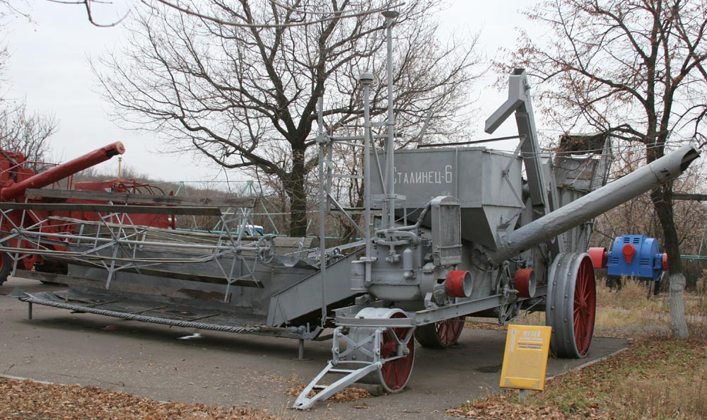 Комбайн «Сталинец-6» в Саратове на Соколовой горе